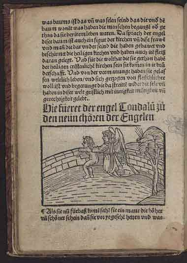 Tundalus und sein Schutzengel schauen über eine der Mauern, die die Himmelsregionen gliedern. aus: Visio Tnugdali, gedruckt bei Matthias Hupfuff in Straßburg (1514)